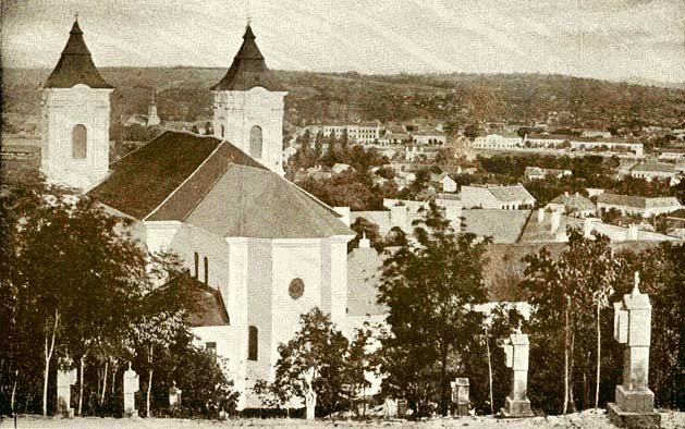 MÁRKI SÁNDOR DÓSA GYÖRGY 1470-1514 A MAGYAR TUDOMÁNYOS AKADÉMIA SEGÉLYEZÉSÉVEL KIADJA A MAGYAR TÖRTÉNELMI TÁRSULAT SZERKESZTI DR. DÉZSI LAJOS BUDAPEST AZ ATHENAEUM R.-T. KÖNYVNYOMDÁJA 1913